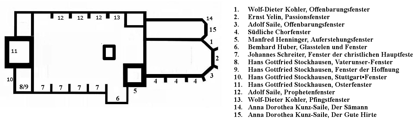 Grundriss der Stiftskirche Stuttgart mit Legende.